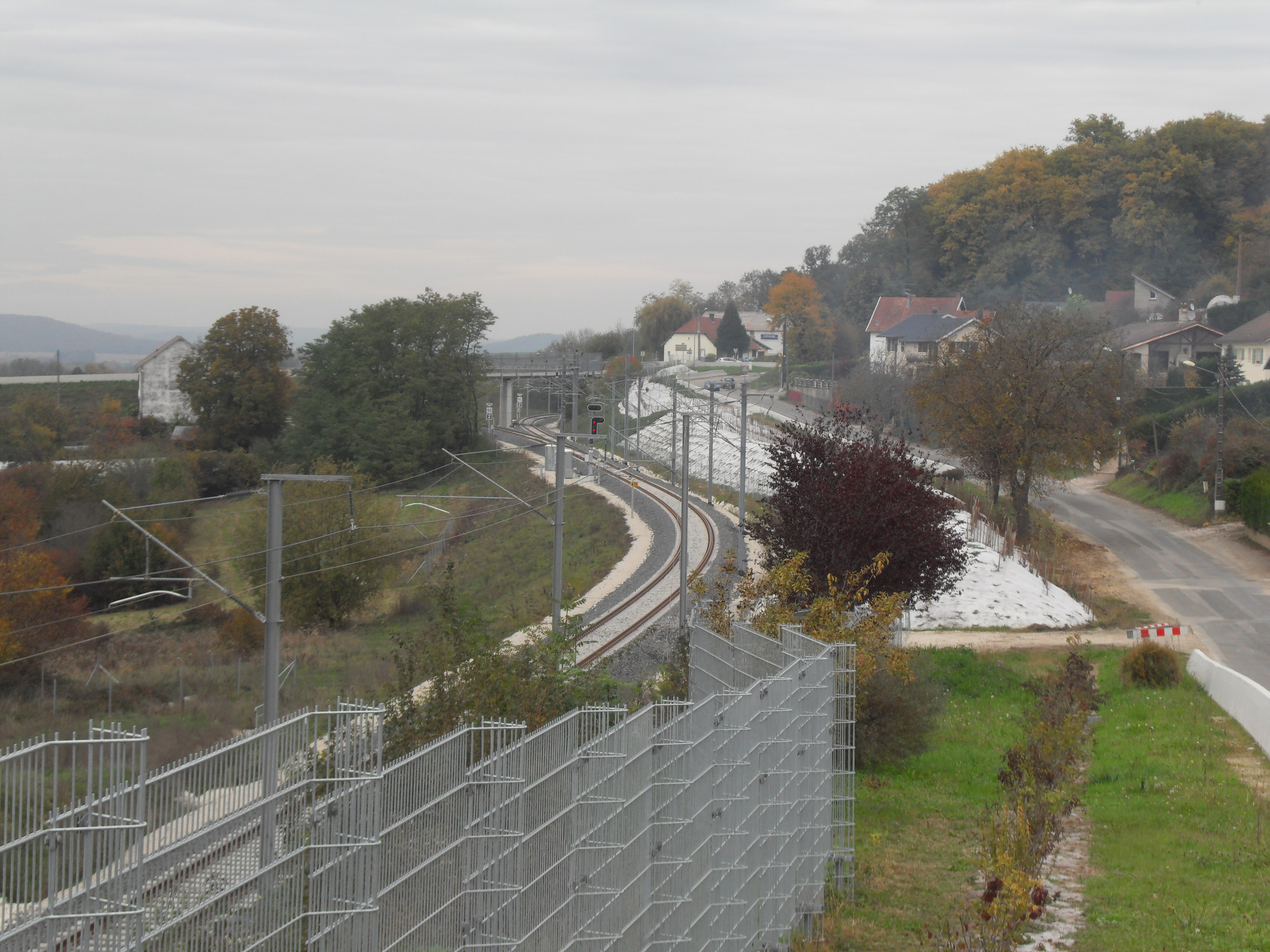 Ligne de chemin de fer reliant la gare de Besançon-Viotte à la gare de Besançon Franche-Comté TGV, au niveau de la commune d'Auxon-Dessus.